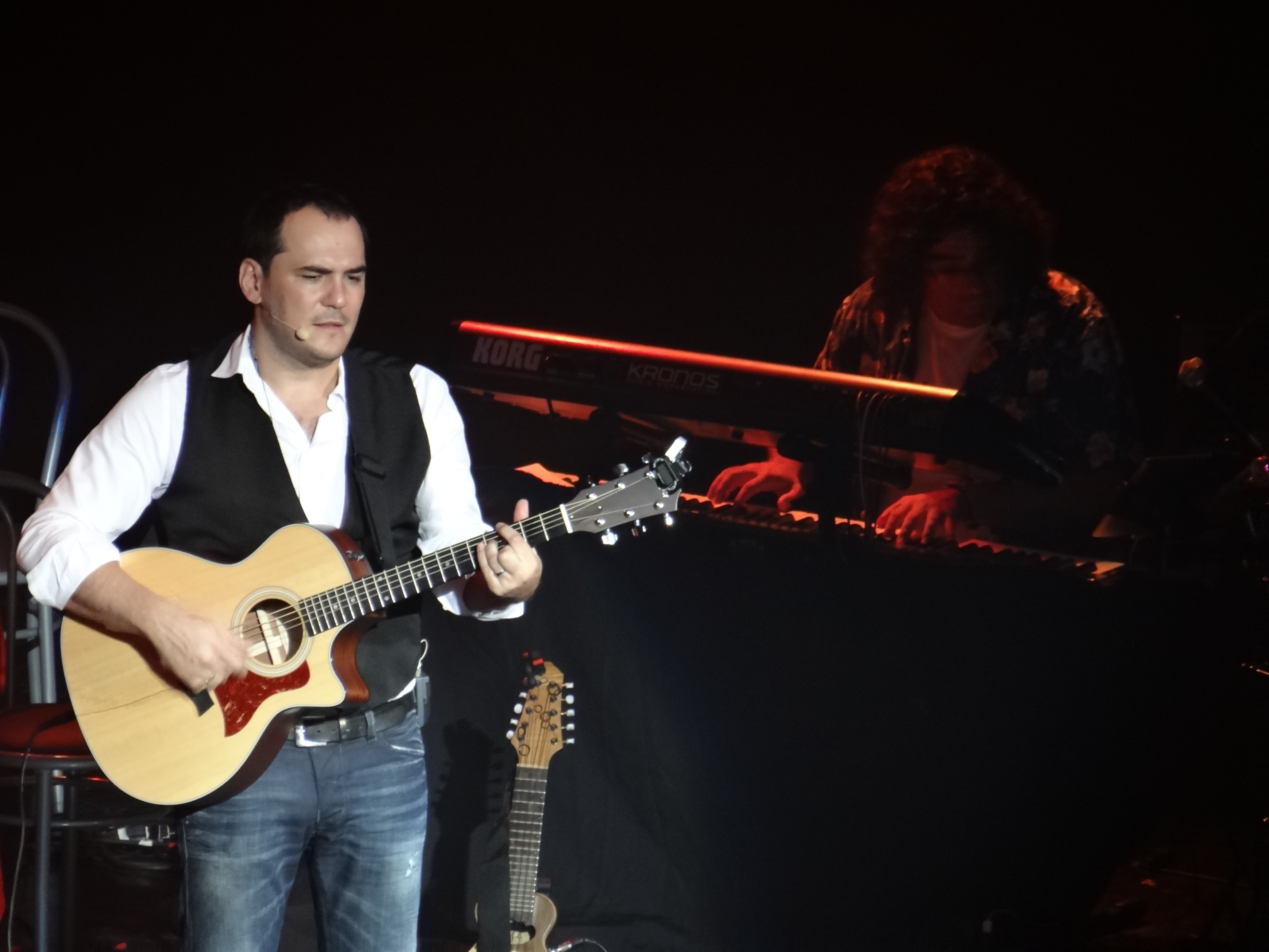 Ismael Serrano en el Teatro Gran Rex en agosto de 2012